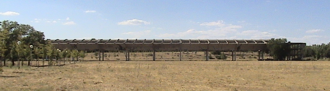 Antiguo hangar del Aeródromo de Barberán y Collar de Alcalá de Henares (Madrid - España) construido en 1943. Actualmente campus exterior de la Universidad de Alcalá.